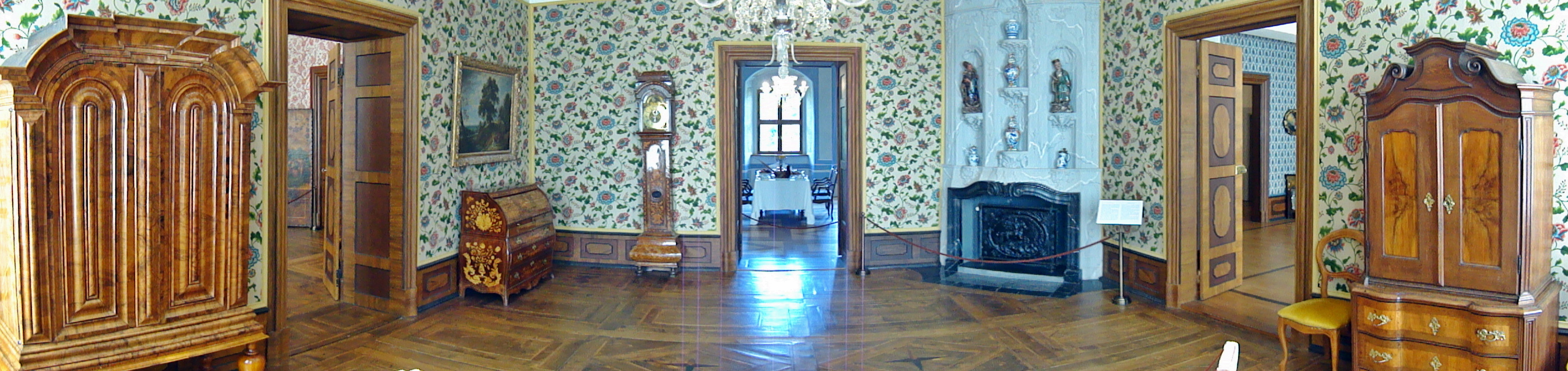 Audienzzimmer (Schloss Delitzsch)